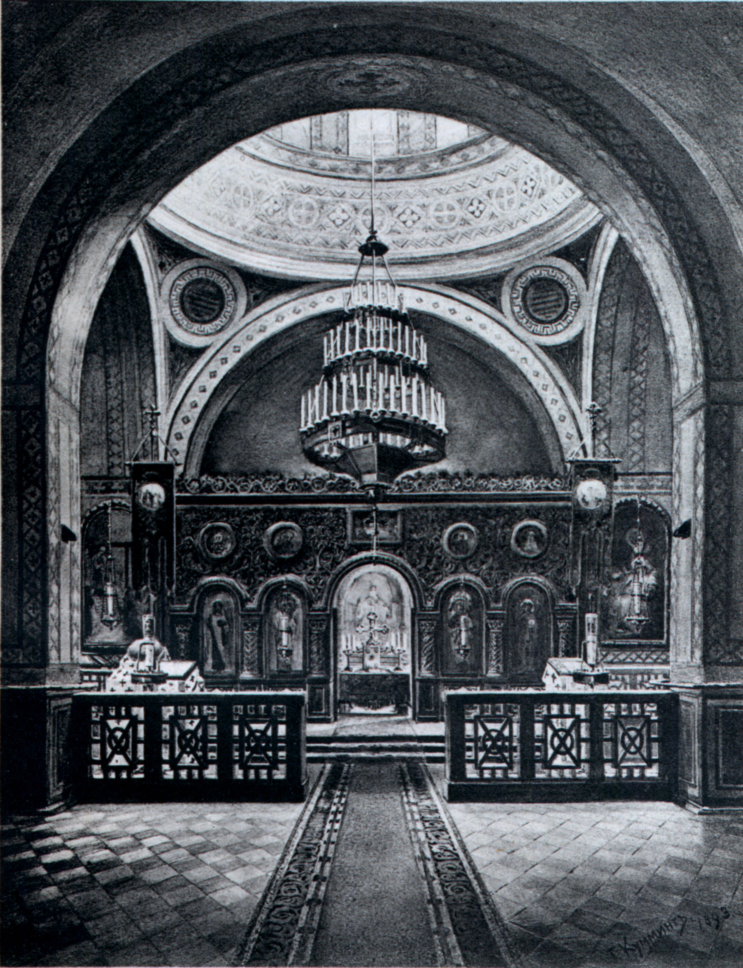 Церковь Рождества Пресвятой Богородицы при Николаевской царскосельской гимназии.